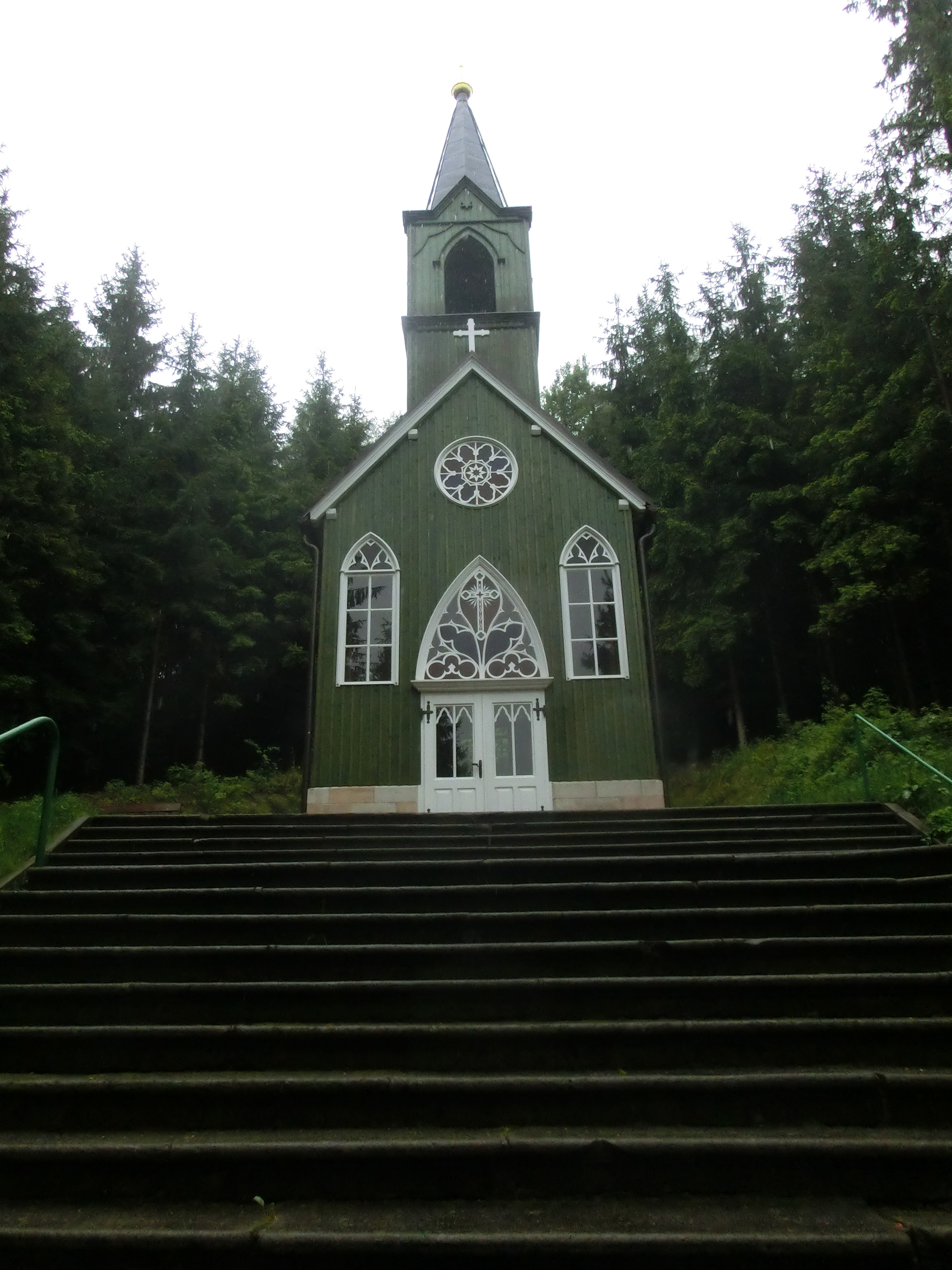 Suchý Důl, Ticháčkův les, Růžencová lesní kaple 3